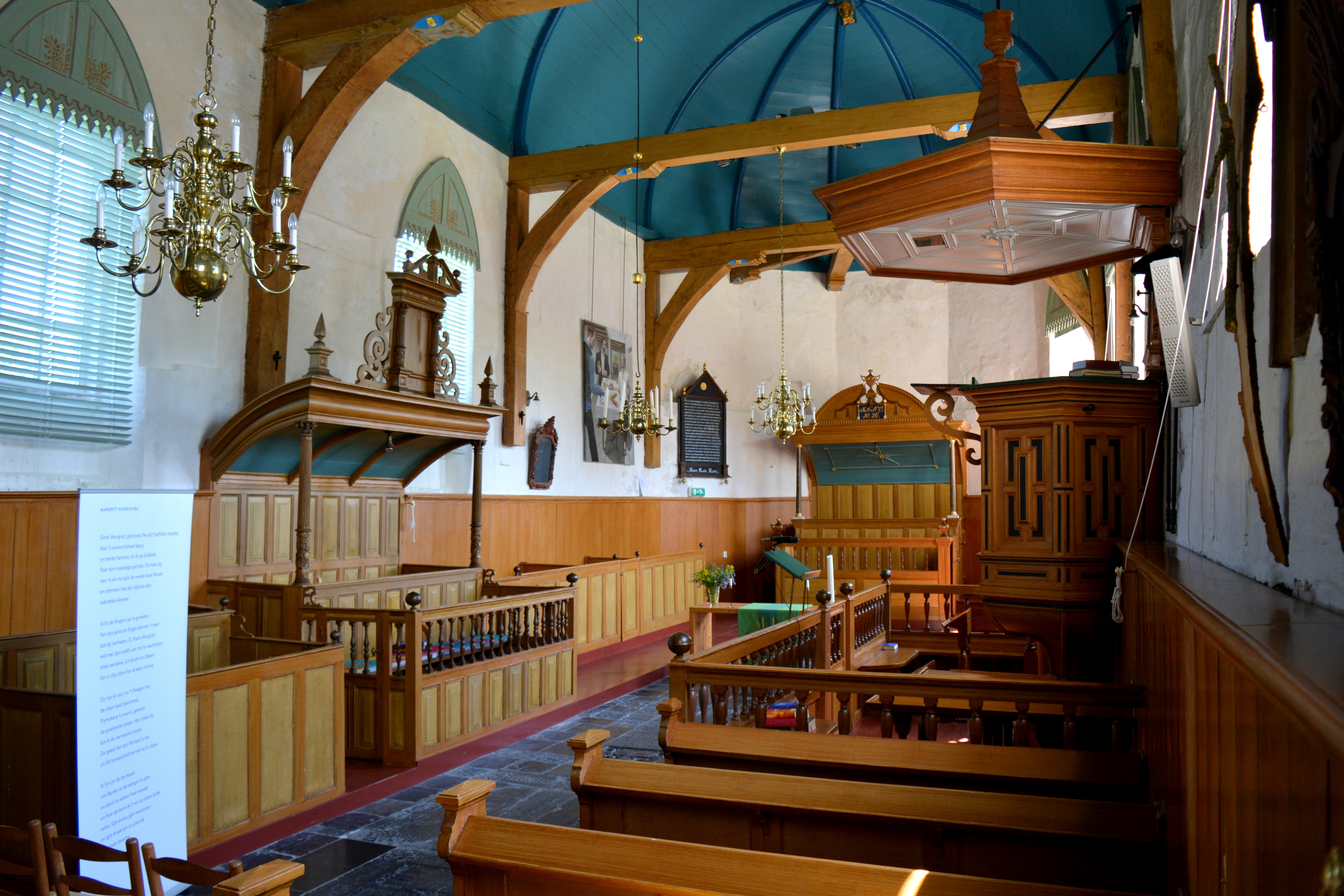 Boksum, Sint-Margrietkerk, interieur